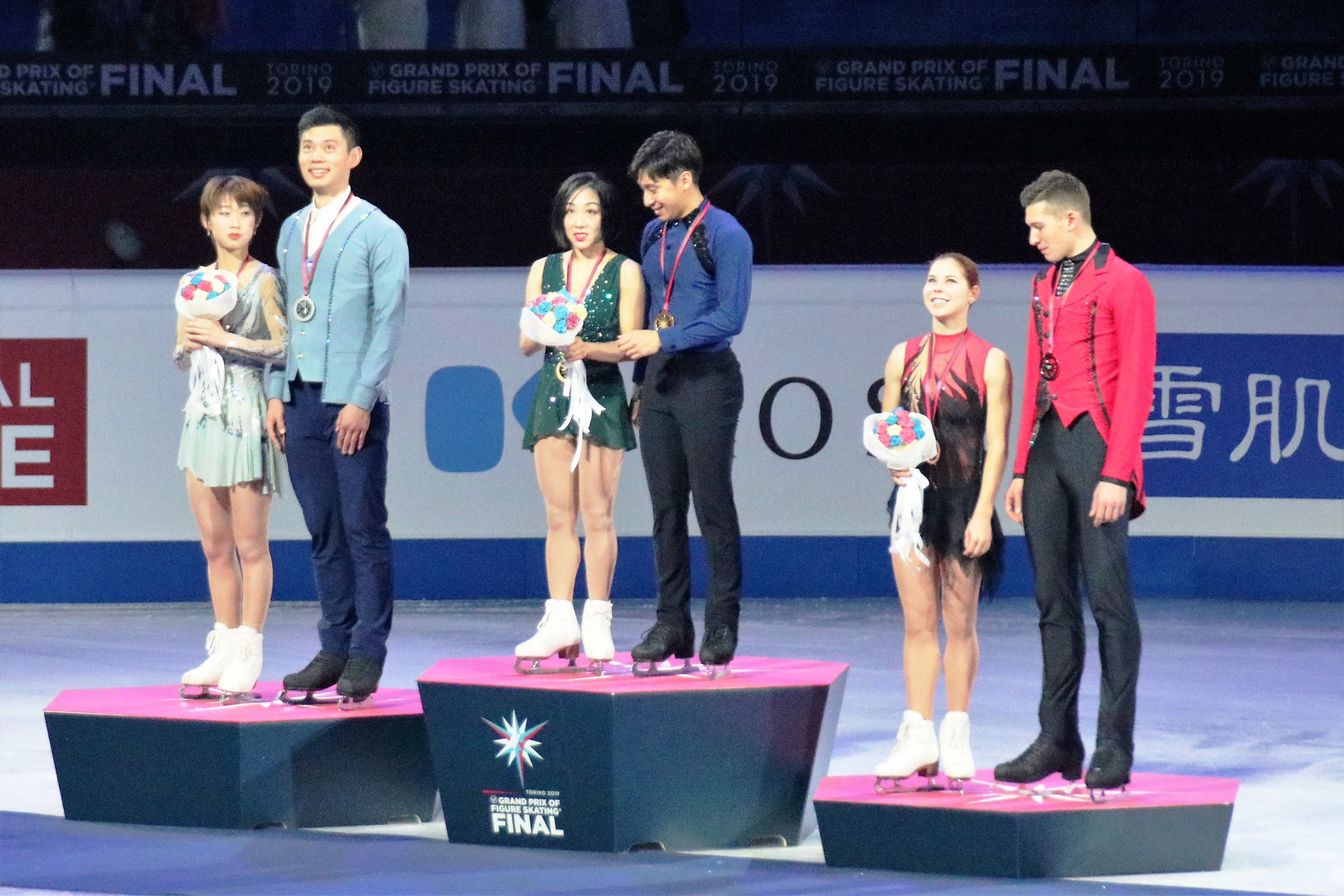 Церемония награждения в парном катании на финале Гран-при 2019-2020